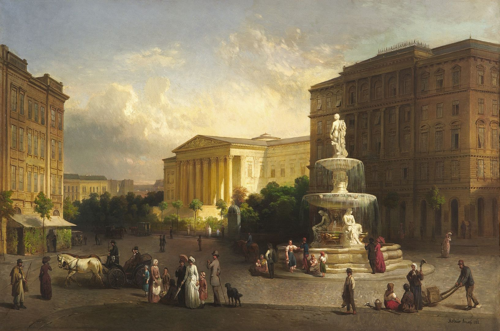 A Kálvin tér 1885-ben. Előtérben a Danubius-kút, háttérben a Nemzeti Múzeum